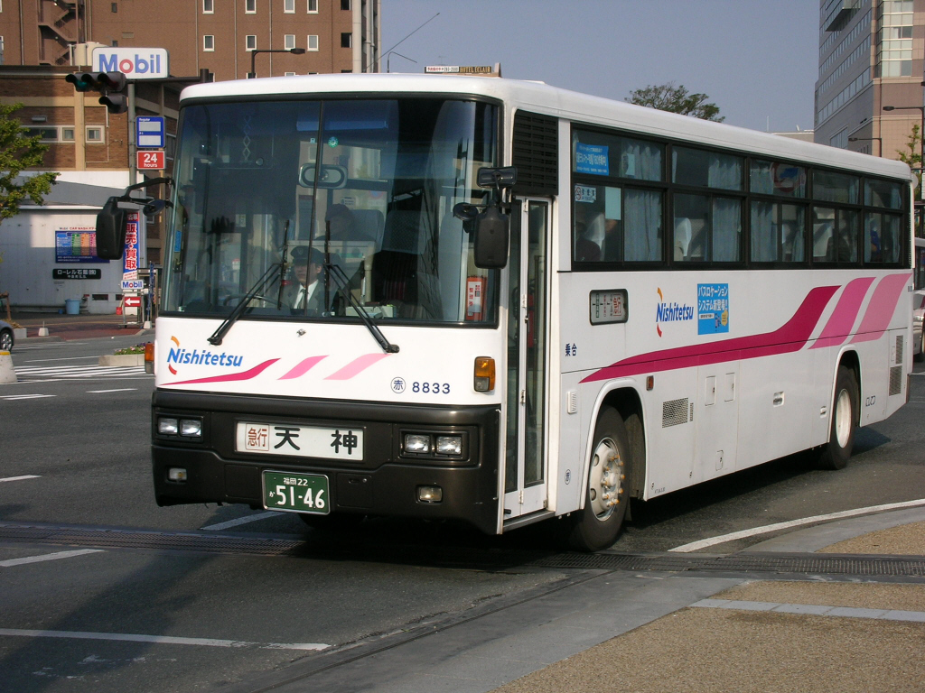 赤間急行 2005-11-28撮影